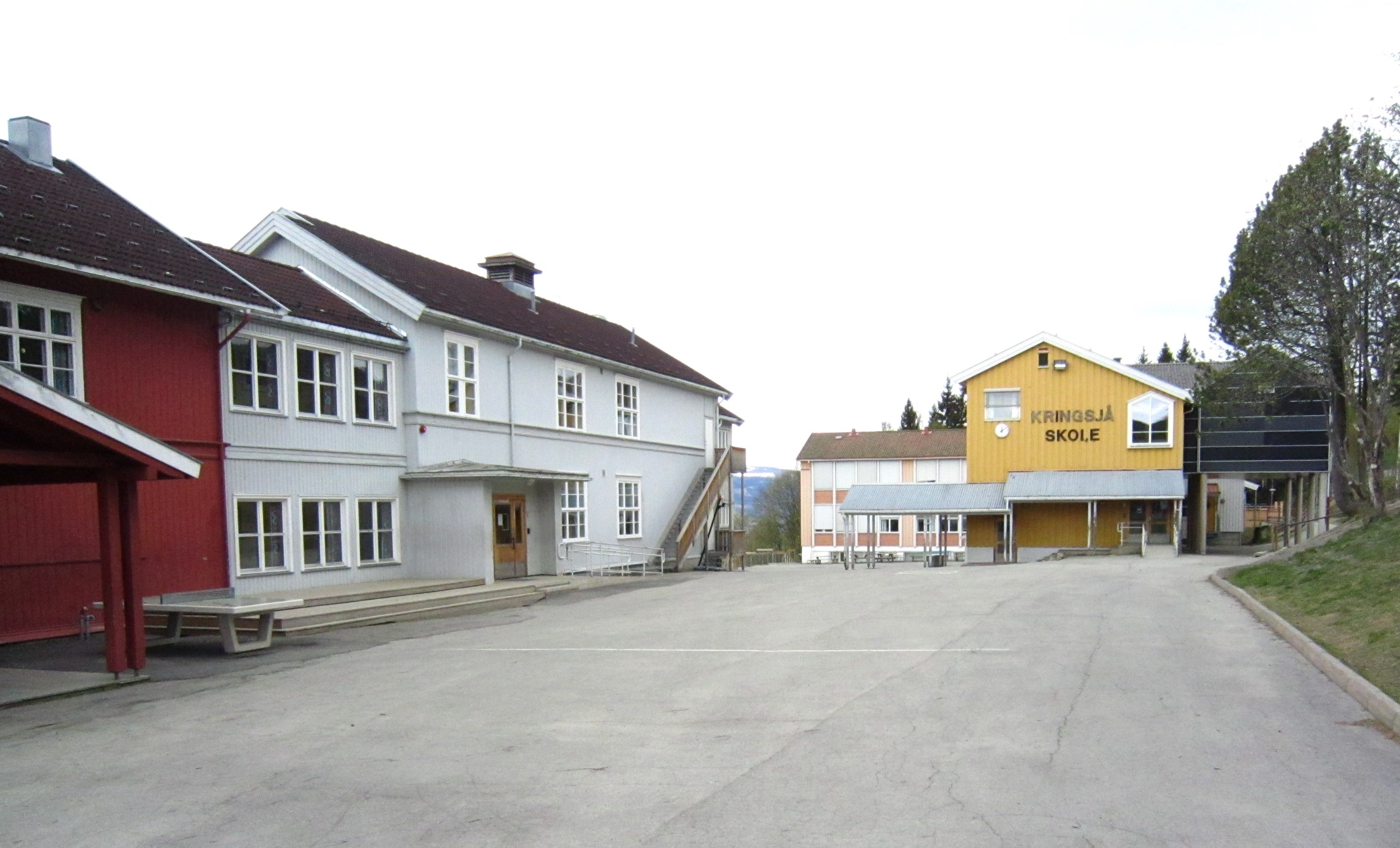 Kringsjå skole på Lillehammer